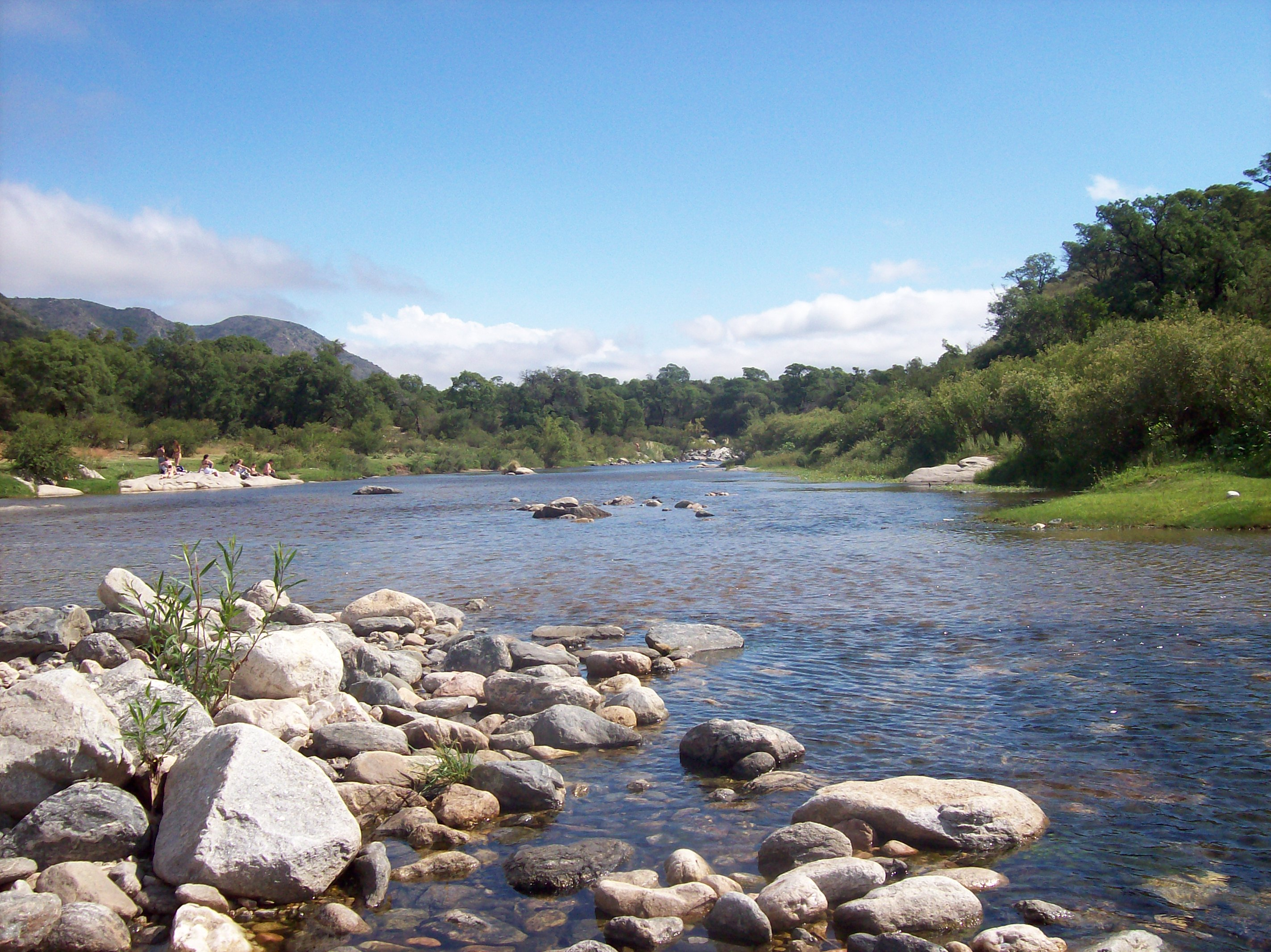 Río Pintos, zona de Cuchi Corral, en la provincia de Córdoba, Argentina